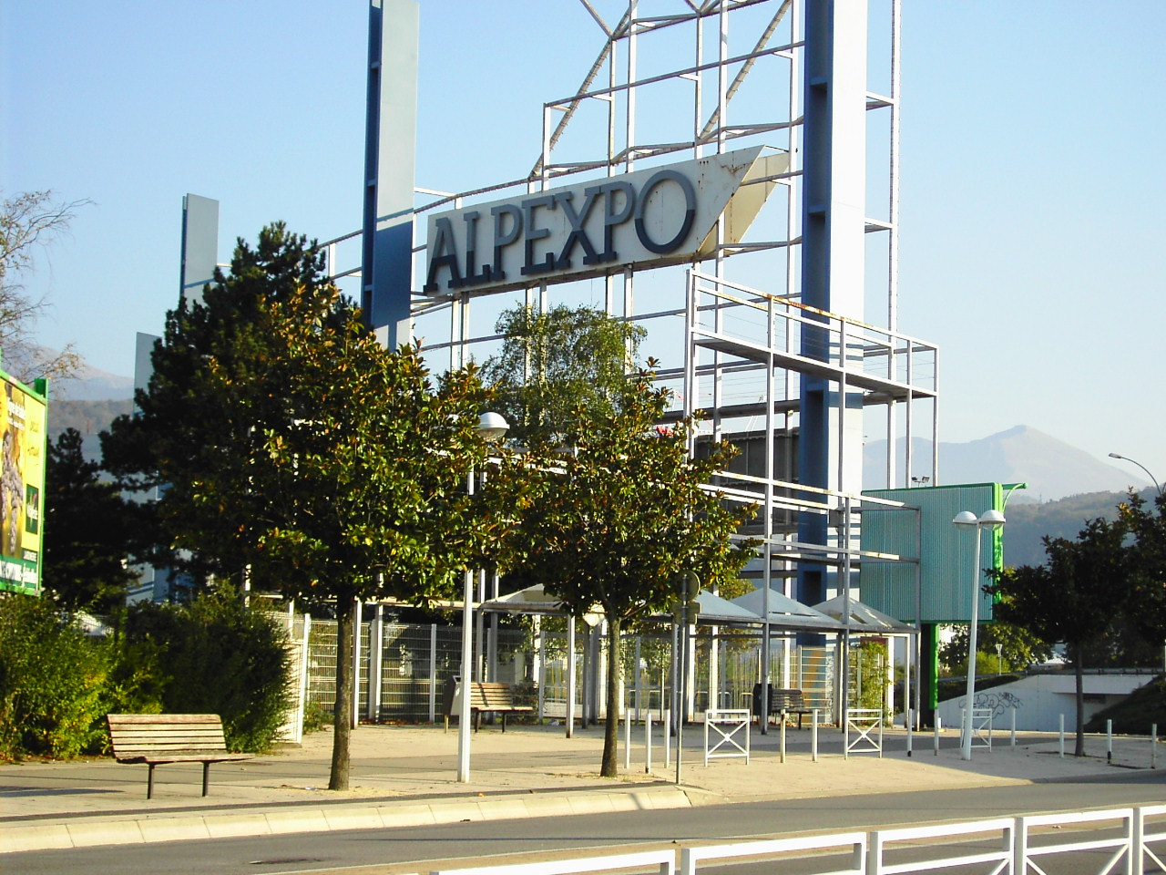 Entrée du parc des exposition Alpexpo à Grenoble